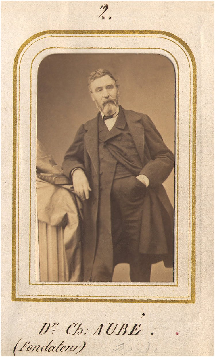 Portrait de Charles Nicolas Aubé